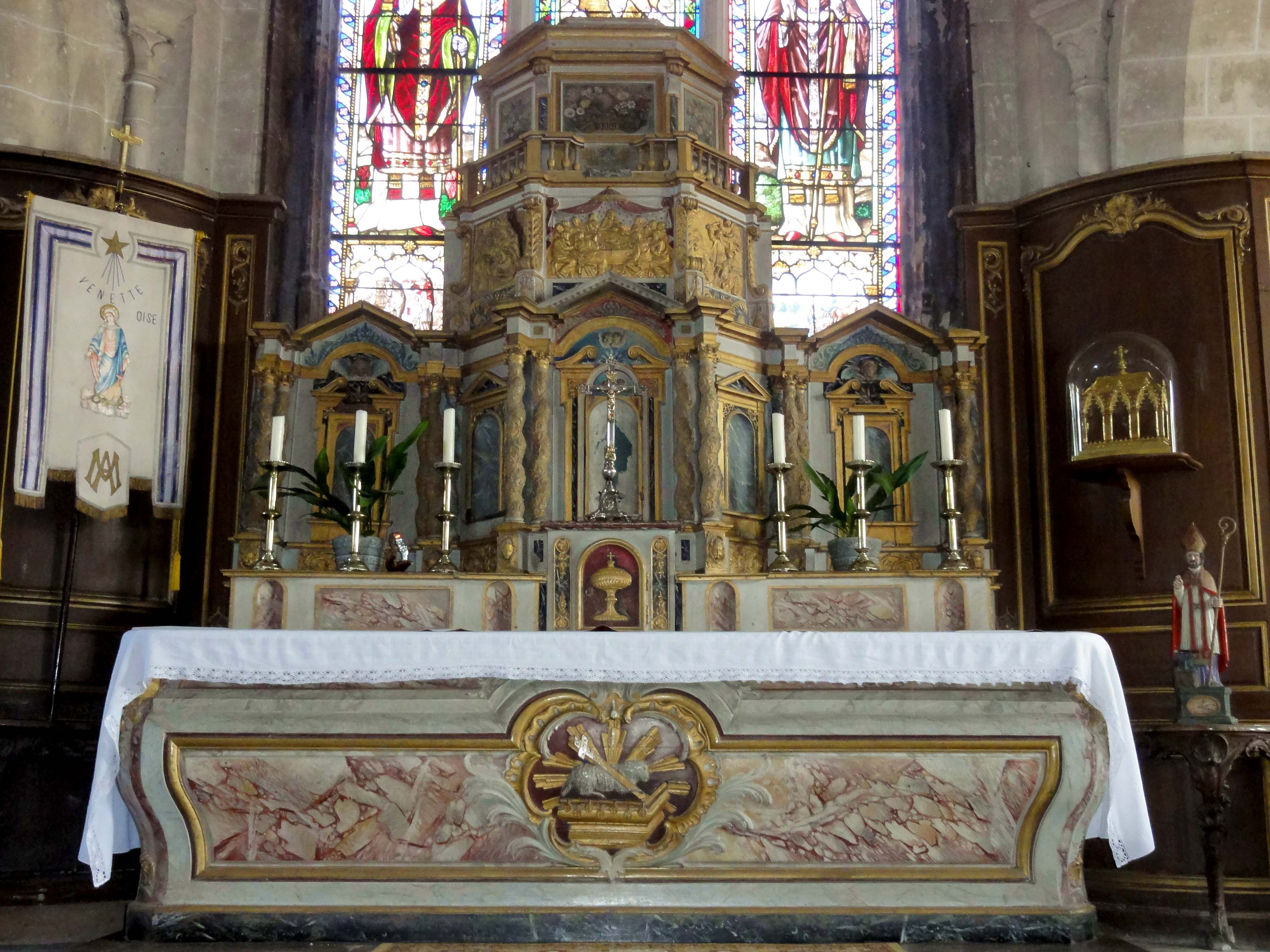 Mobilier de l'église (voir titre).